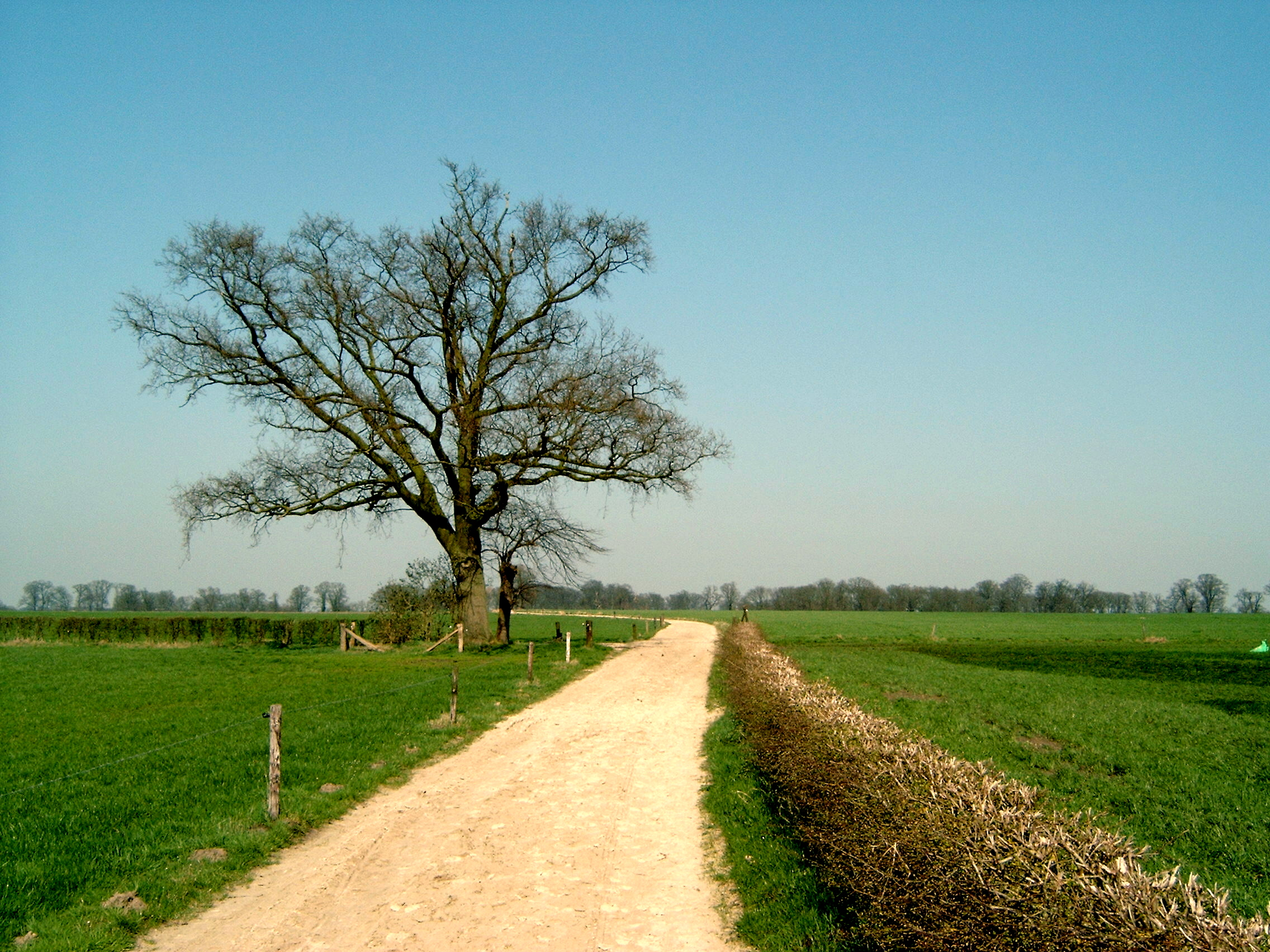 Landgoed "Twickel", near Delden.